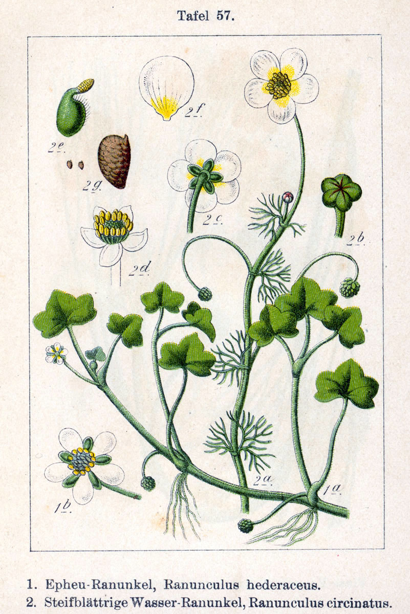 1. Ranunculus hederaceus L. 2. Ranunculus circinatus Sibth. Original Description 1. Epheu-Ranunkel, Ranunculus hederaceus 2. Steifblättrige Wasser-Ranunkel, Ranunculus circinatus